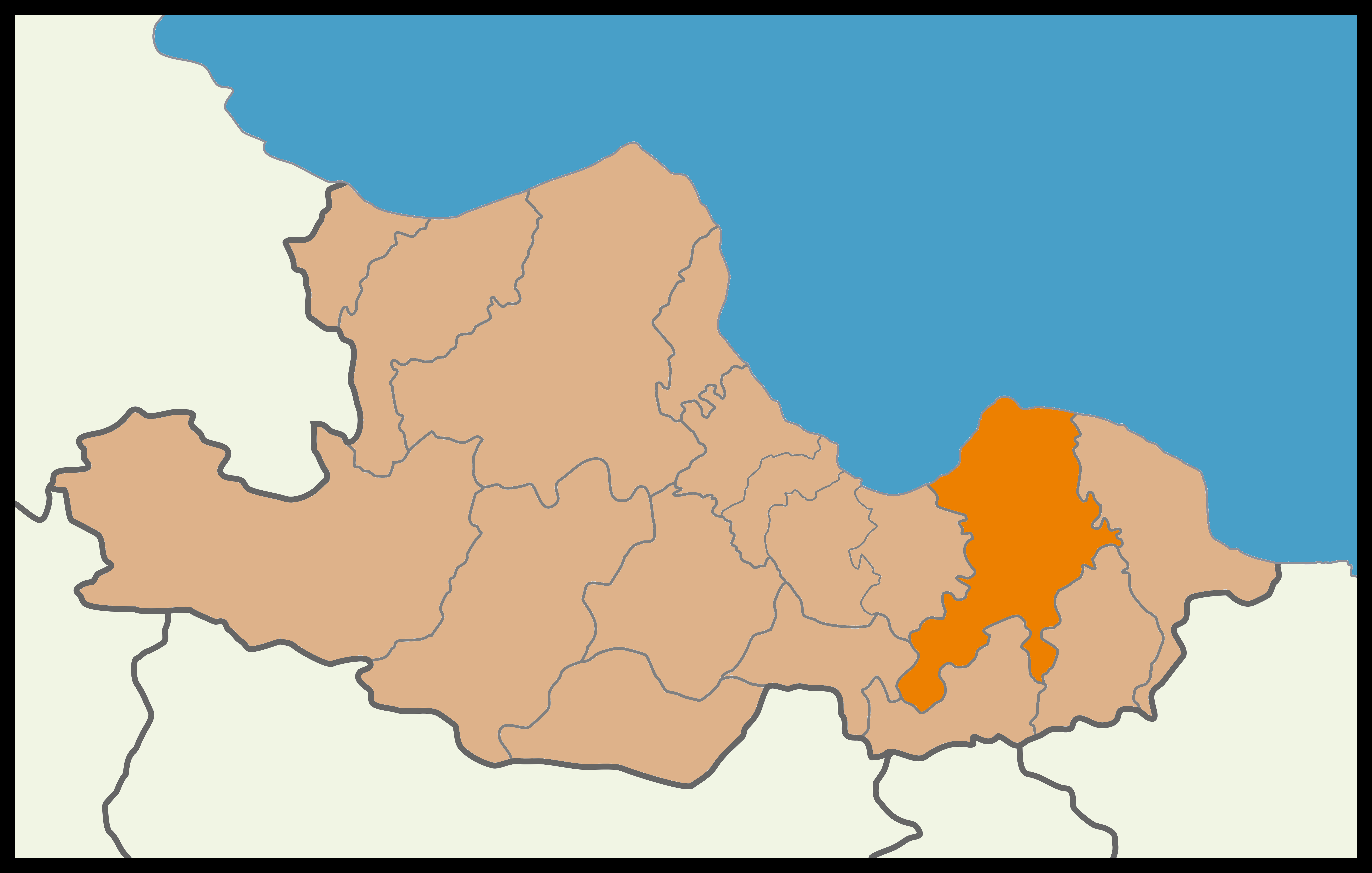 Samsun'un Çarşamba ilçesinin 2014 Türkiye yerel seçimleri haritası.